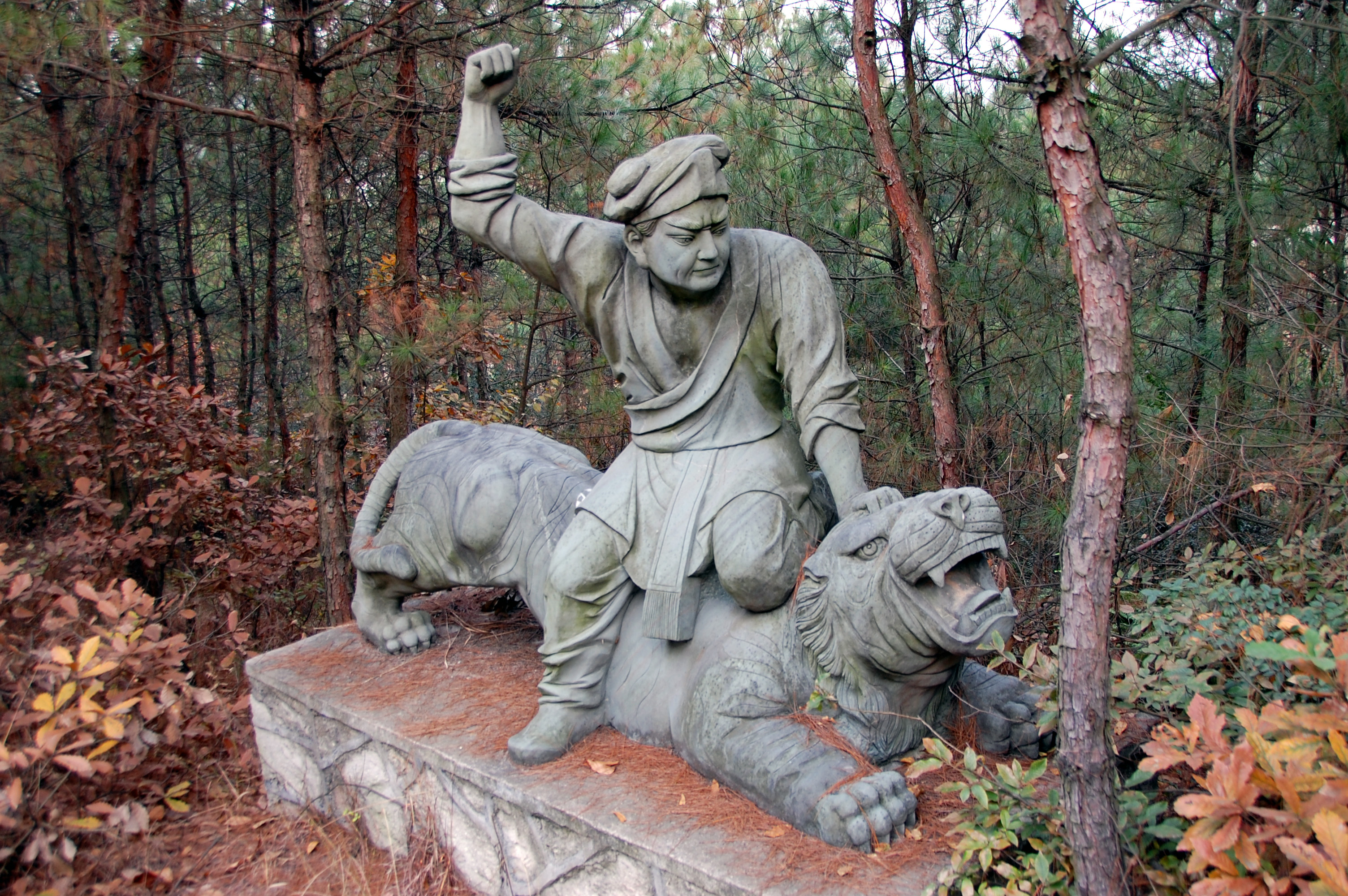 清明上河図/清明上河图